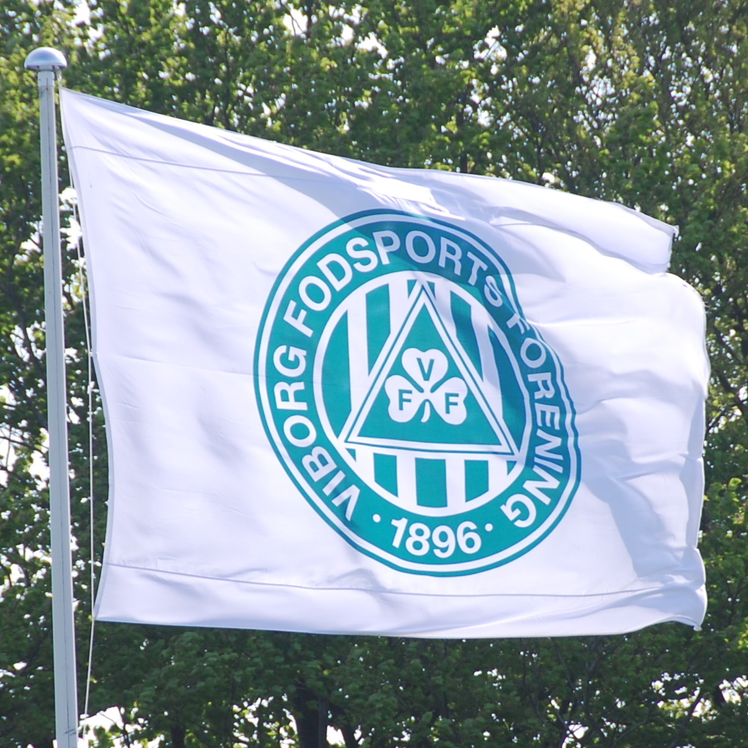 Flag med logoet for fodboldklubben Viborg Fodsports Forening, placeret ved klubbens træningsanlæg på Kirkebækvej i Viborg.